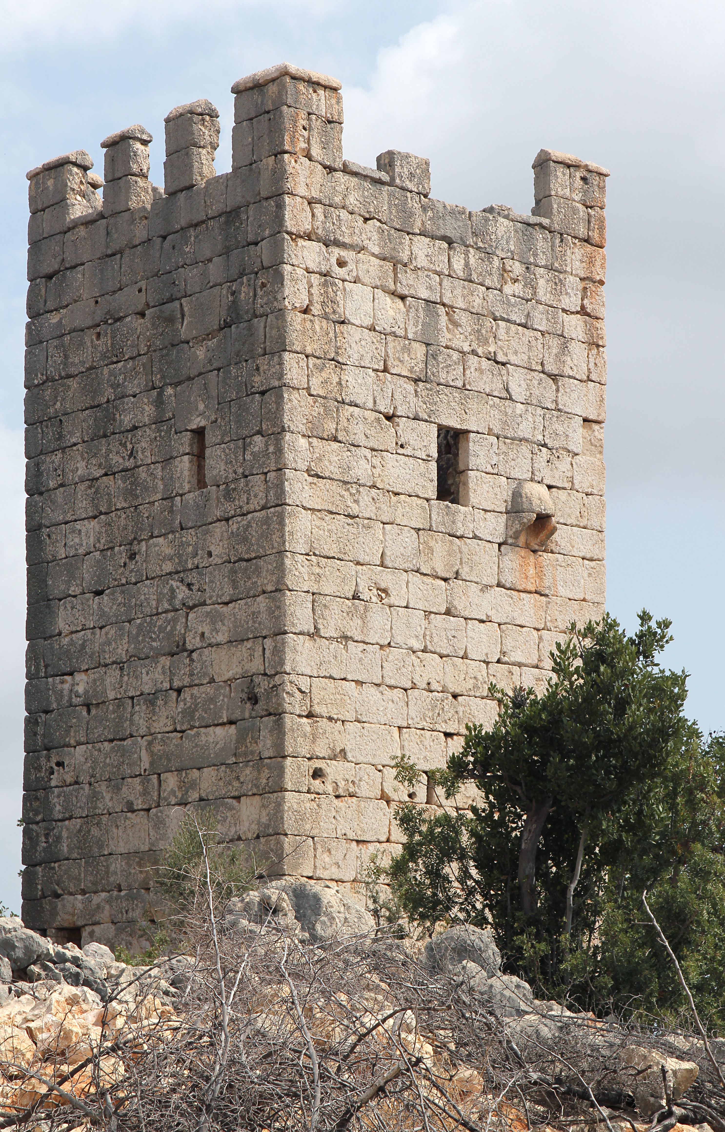 Kilikischer Turm von Akkum bei Kızkalesi in der Südtürkei, Turm von Südwesten